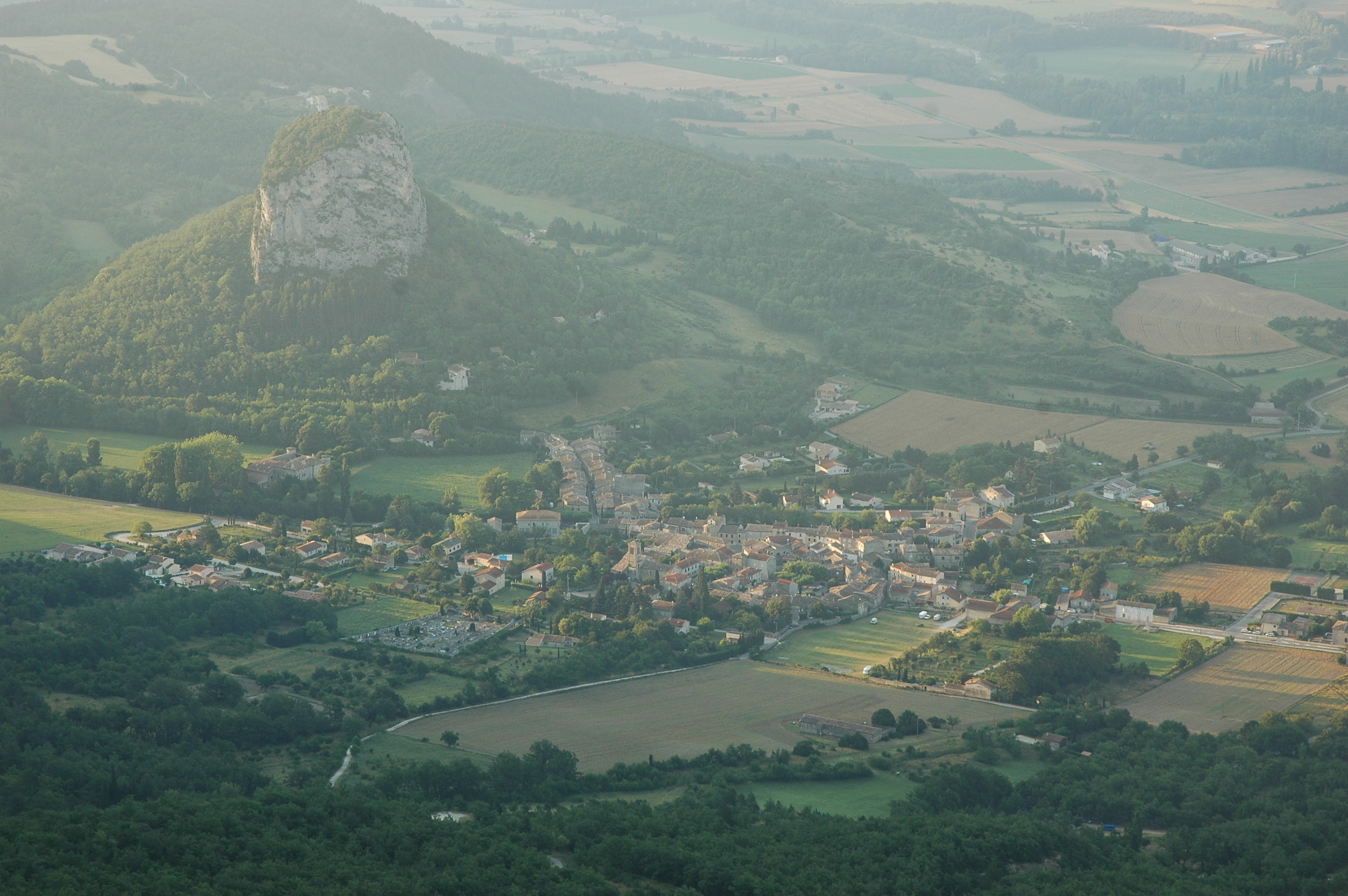 Saou depuis la Poupoune.